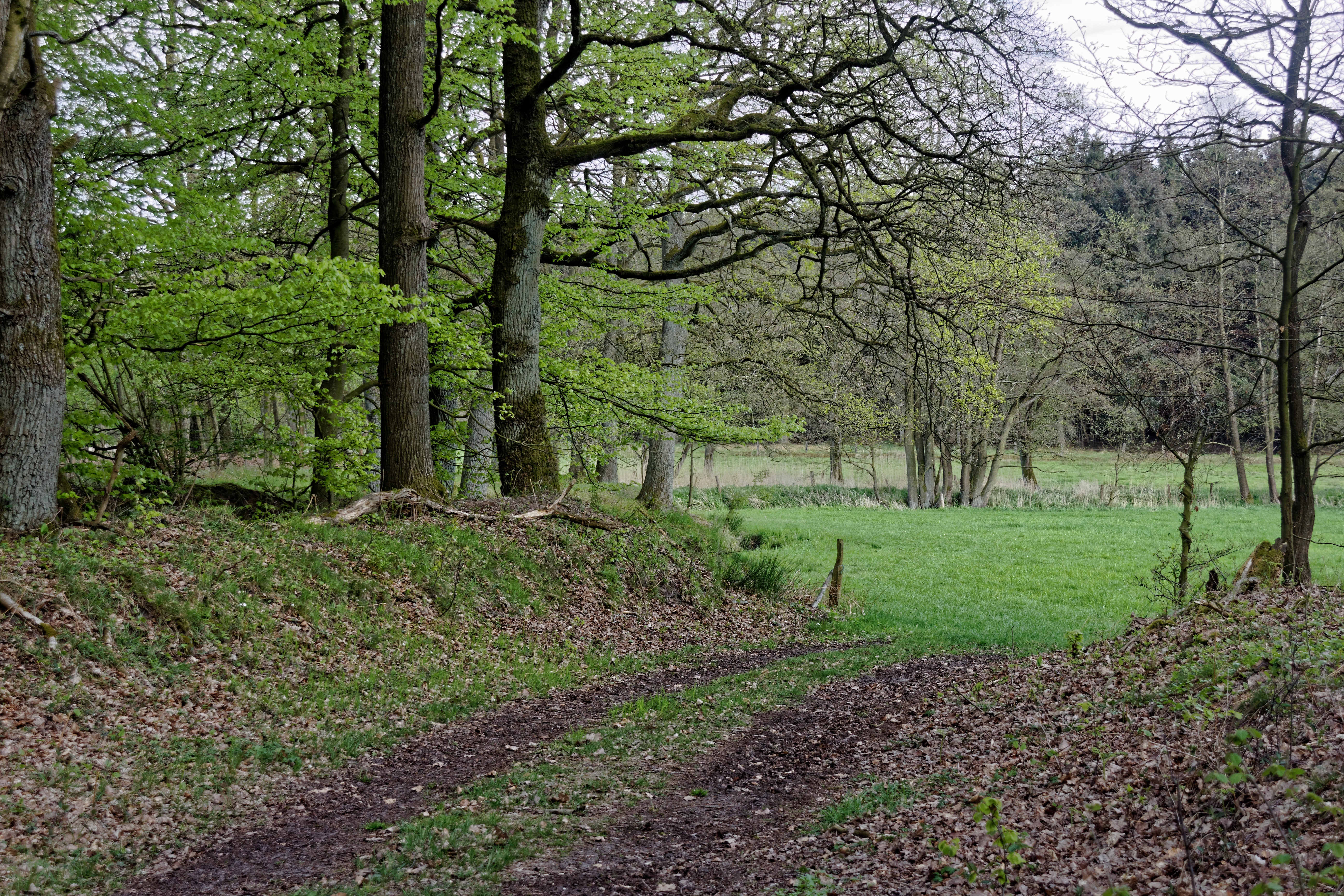 Osterautal nahe Heidmühlen, FFH-Gebiet, Weg zu den Wiesen